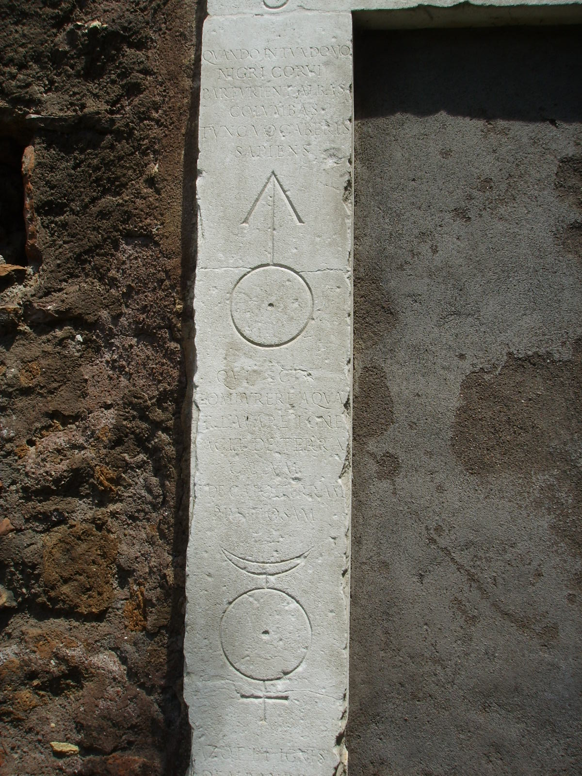 Magic gate (Porta magica) in Piazza Vittorio Emanuele, in Rome, Italy